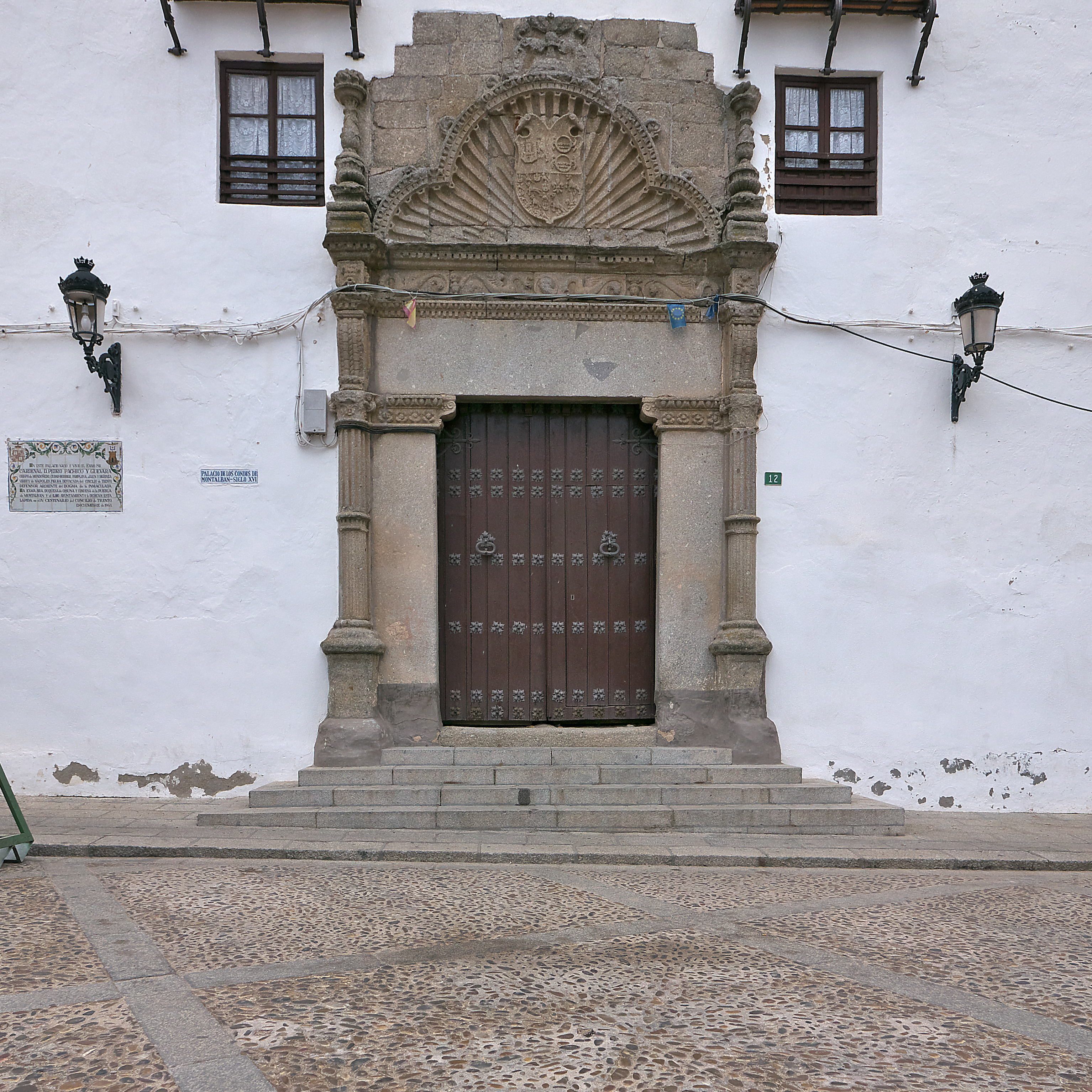 Alonso Téllez Girón reforma, principios del XVI, el palacio de su padre, el poderoso Juan Pacheco.